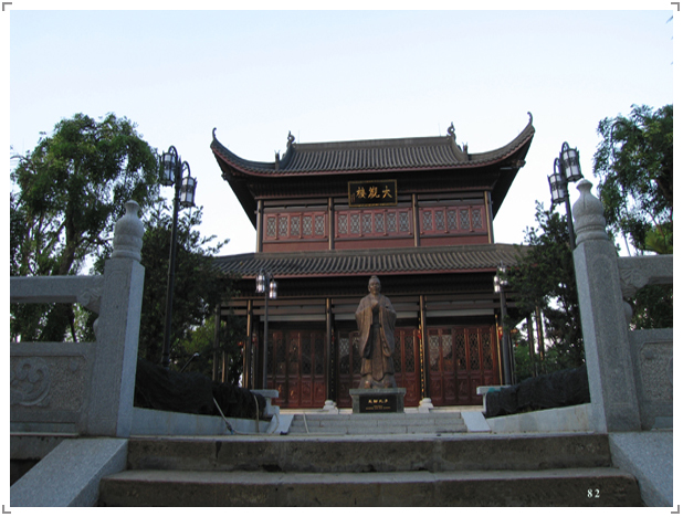 大观楼与孔子像